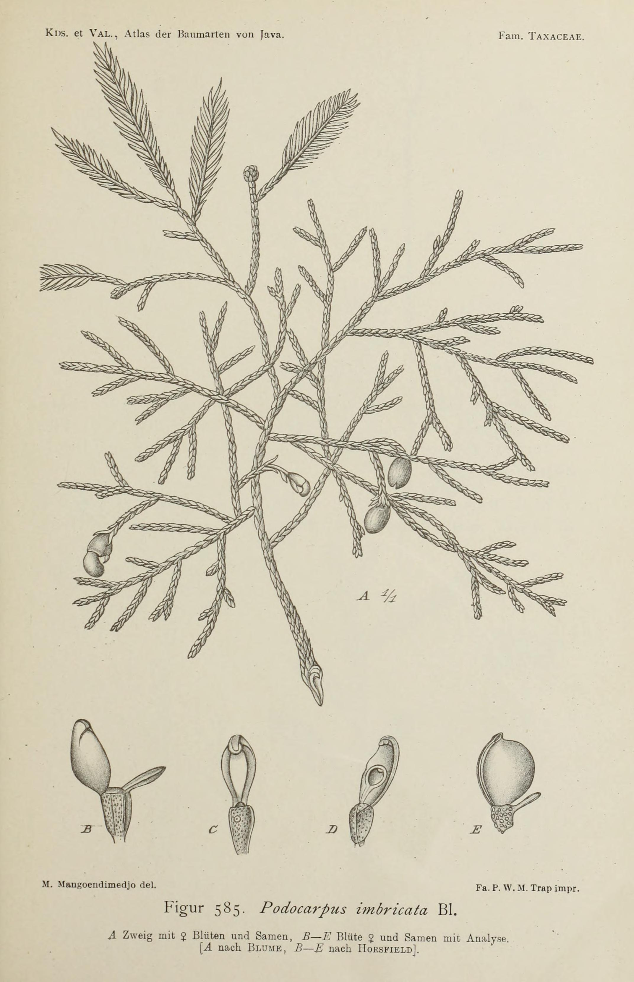 Atlas der baumarten von Java : im anschluss an die "Bijdragen tot de kennis der boomsoorten van Java" / zusammengestellt von dr. S.H. Koorders und dr. Th. Valeton ; mit unterstützung der Niederländsch- indischen regierung ; Herausgegeben von dr. S.H. Koorders.